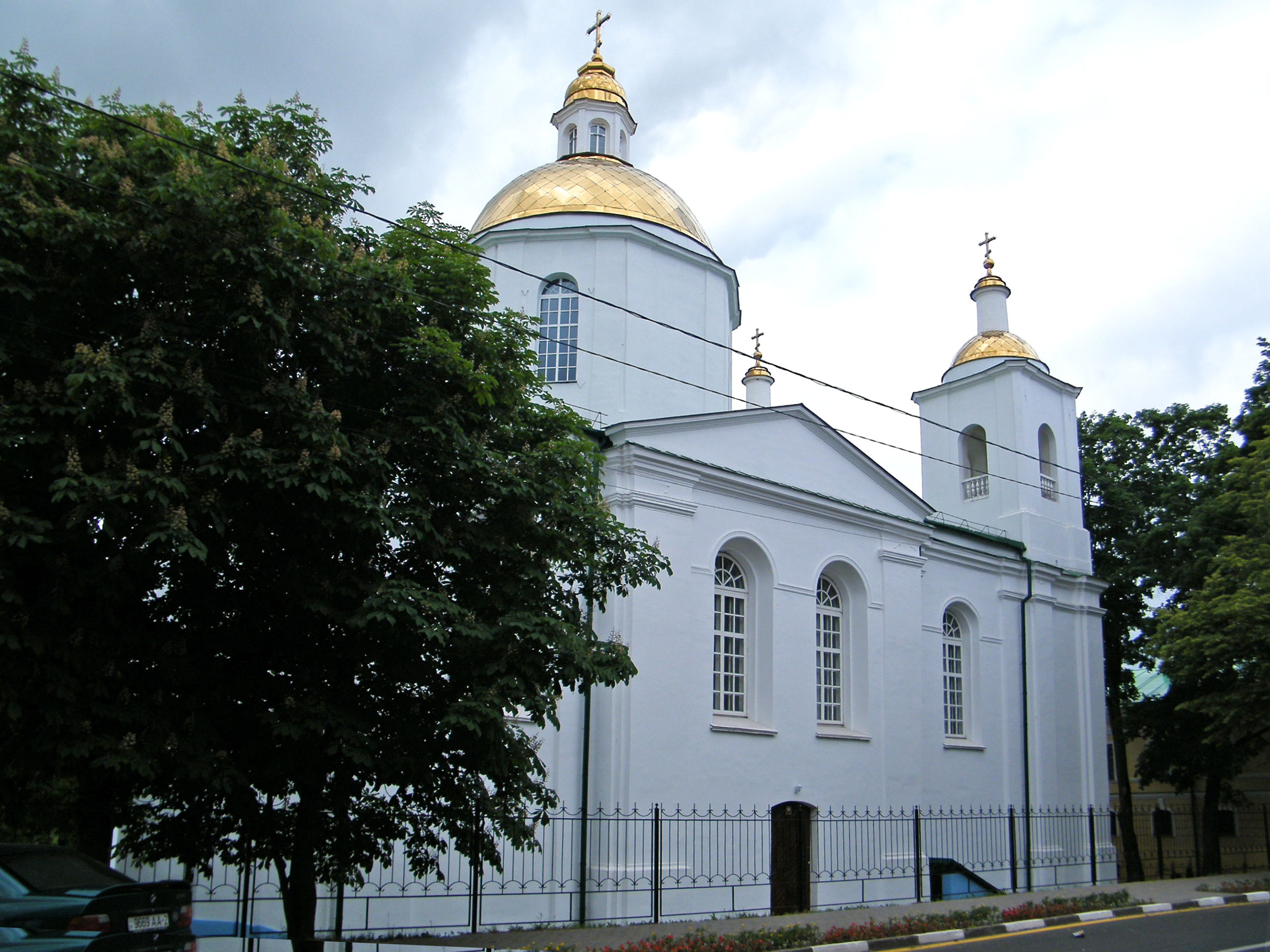 Богоявленский собор